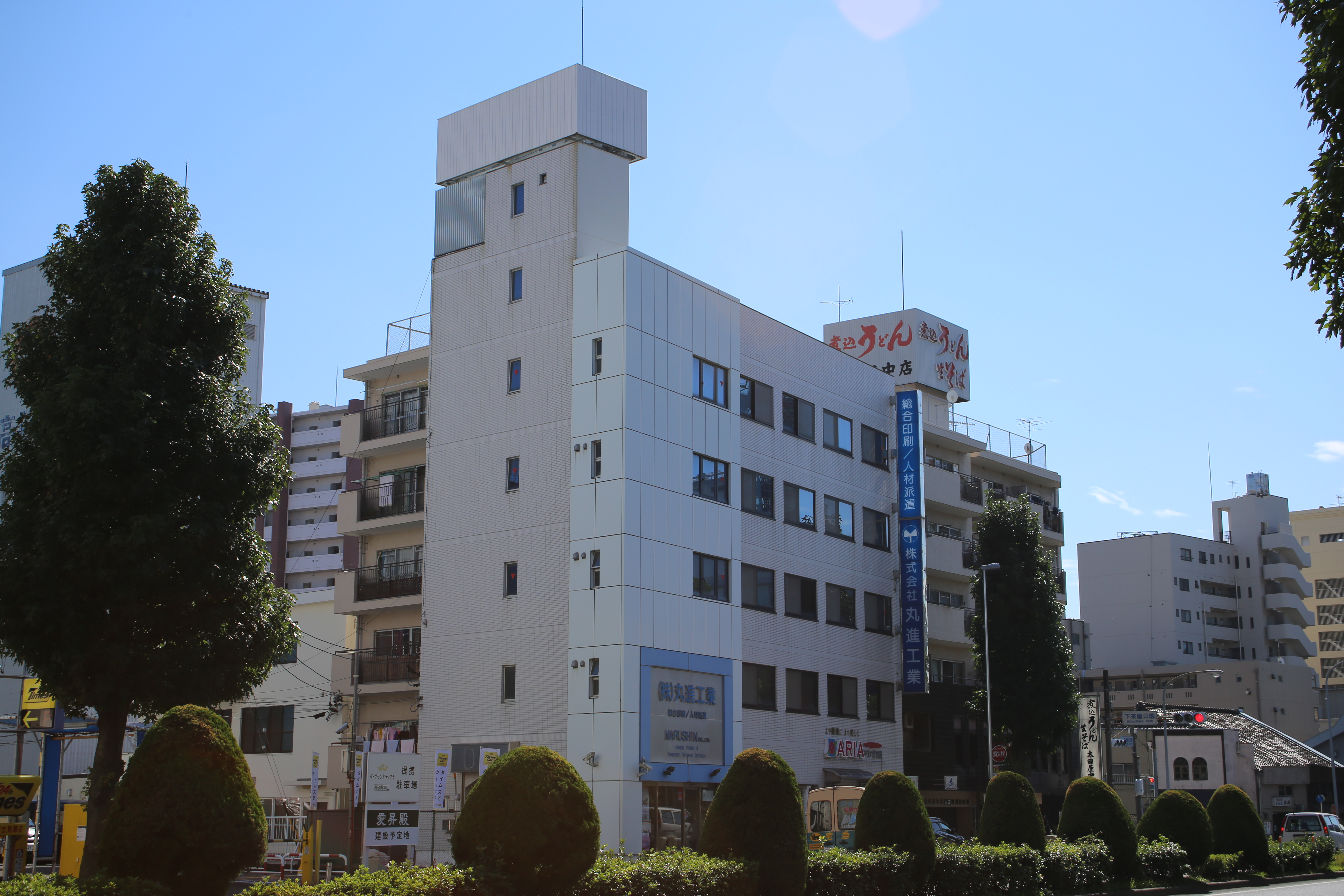 名古屋市中区富士見町の丸進工業本社を西側公道北側より撮影